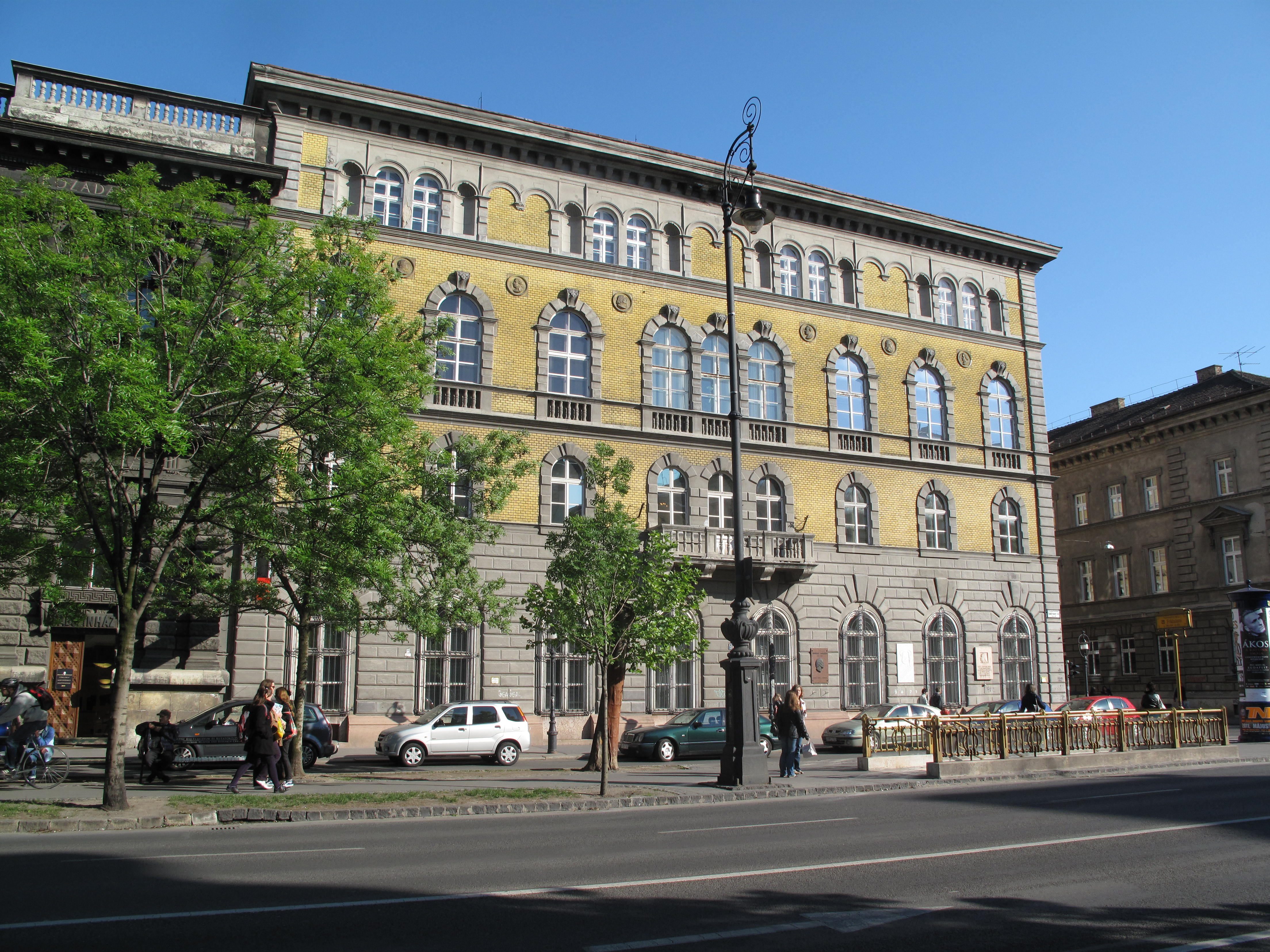 Budapešť